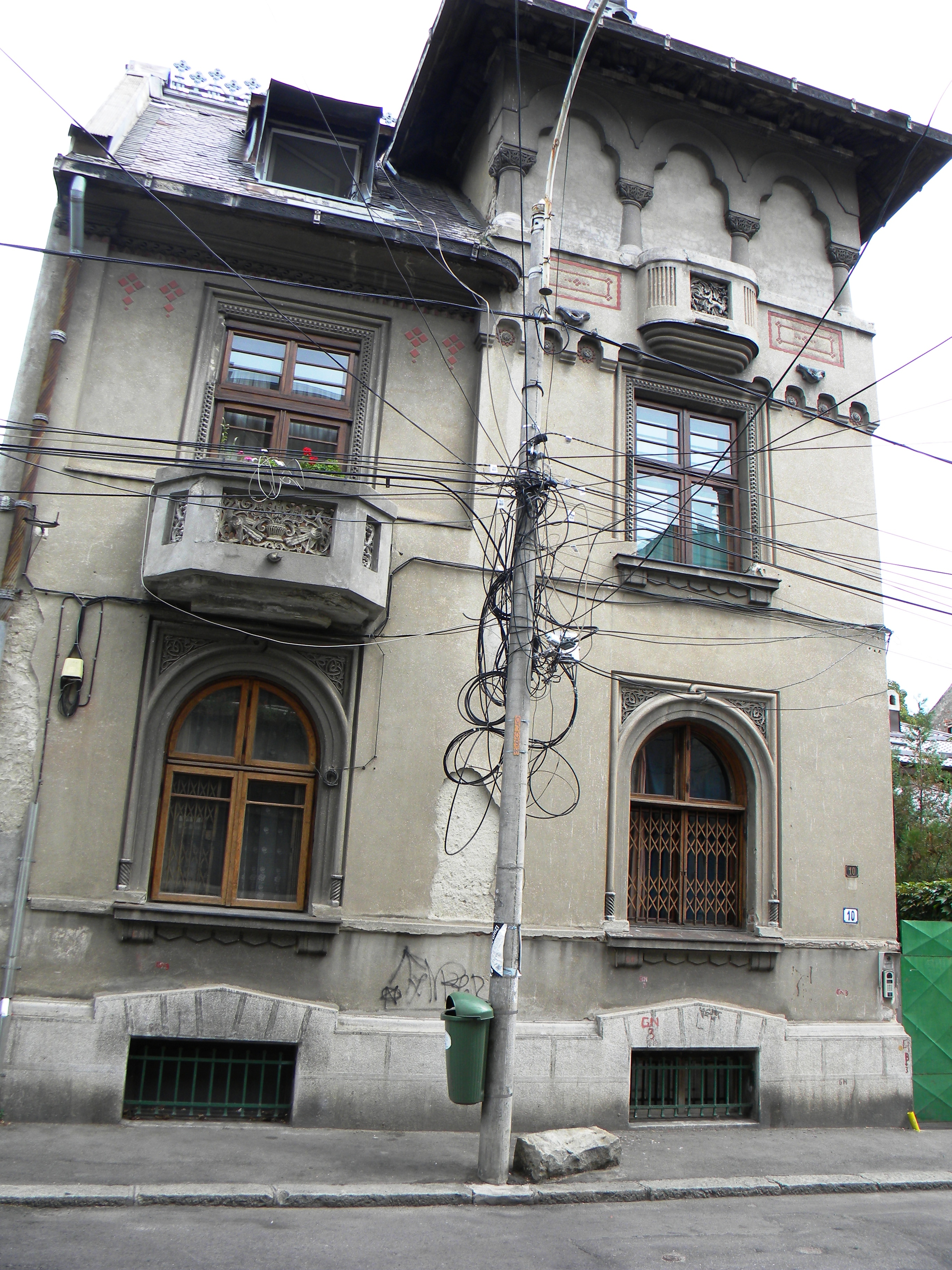 Bucuresti, Romania, Casa pe Str. Vasile Alecsandri nr. 10; B-II-m-B-17945